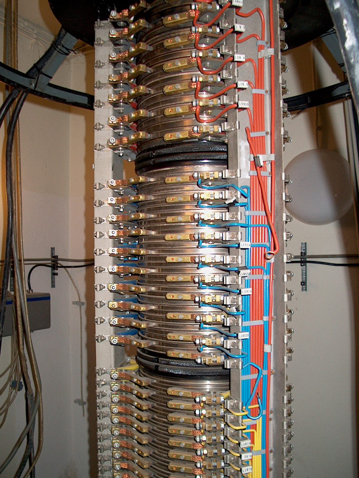 Schleifkontaktsatz des Radioteleskops Astropeiler, Bad Münstereifel